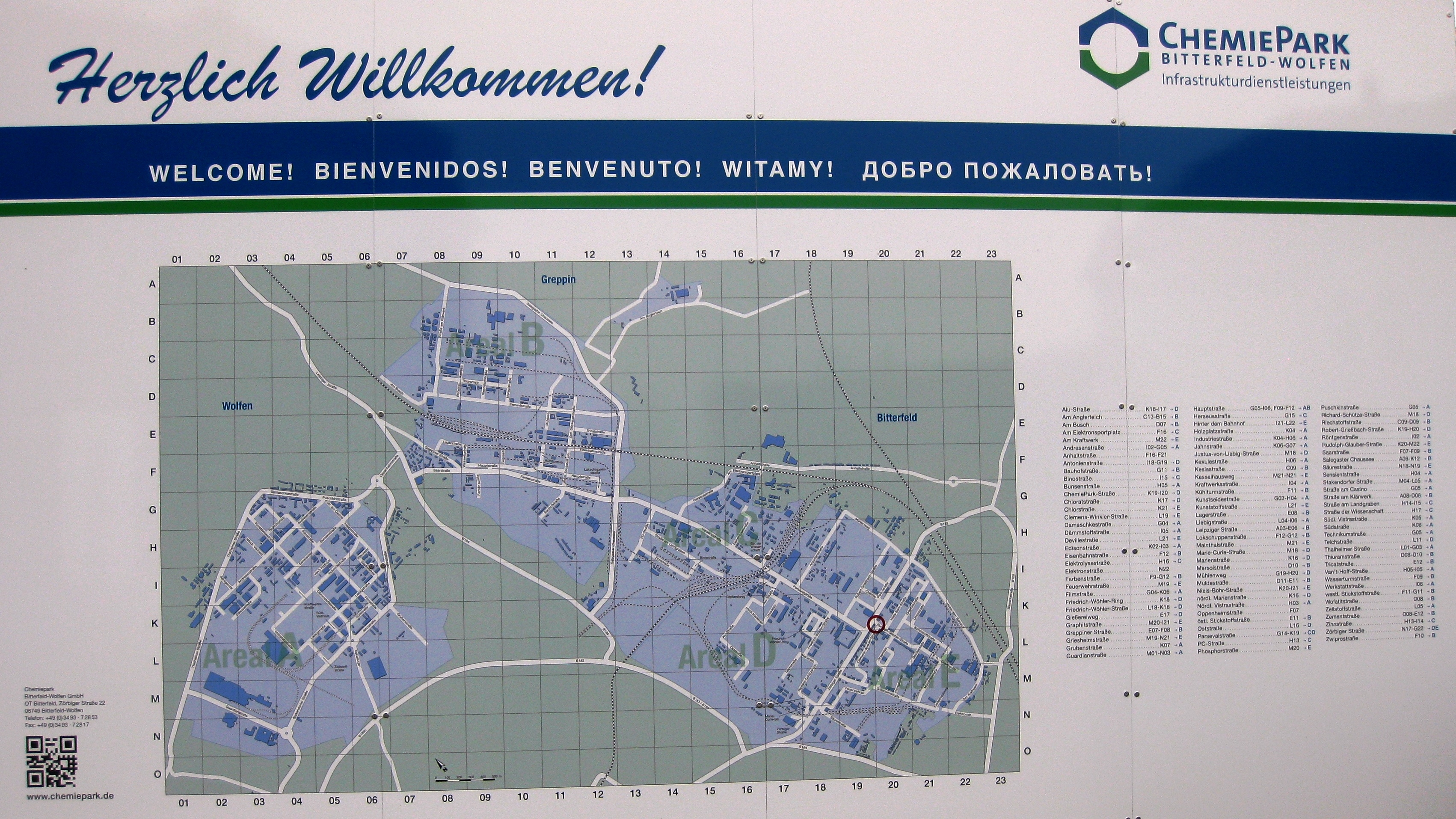 Plan des Chemiepark Bitterfeld-Wolfen